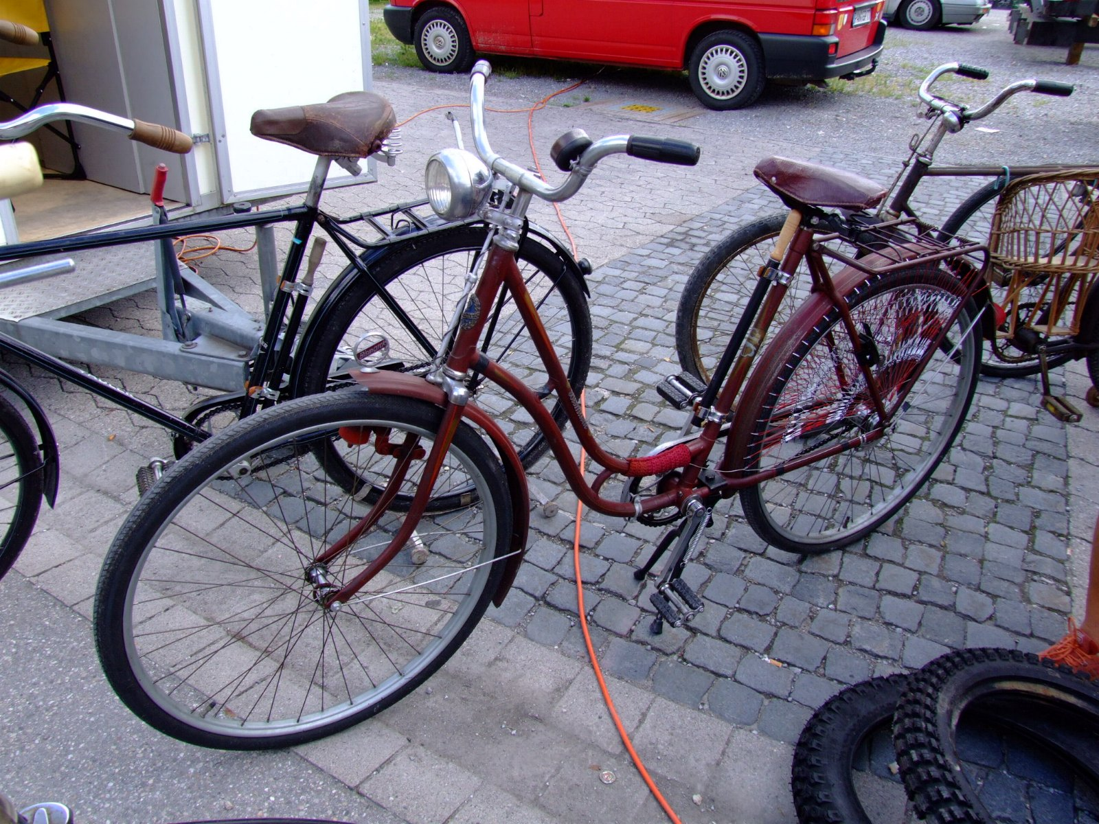 Bismark Radl